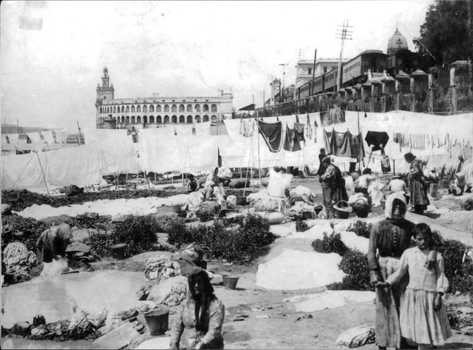 Buenos Aires. Lavanderas en el Bajo al pie del muelle de pasajeros, al fondo la aduana y el ferrocarril, 1880.